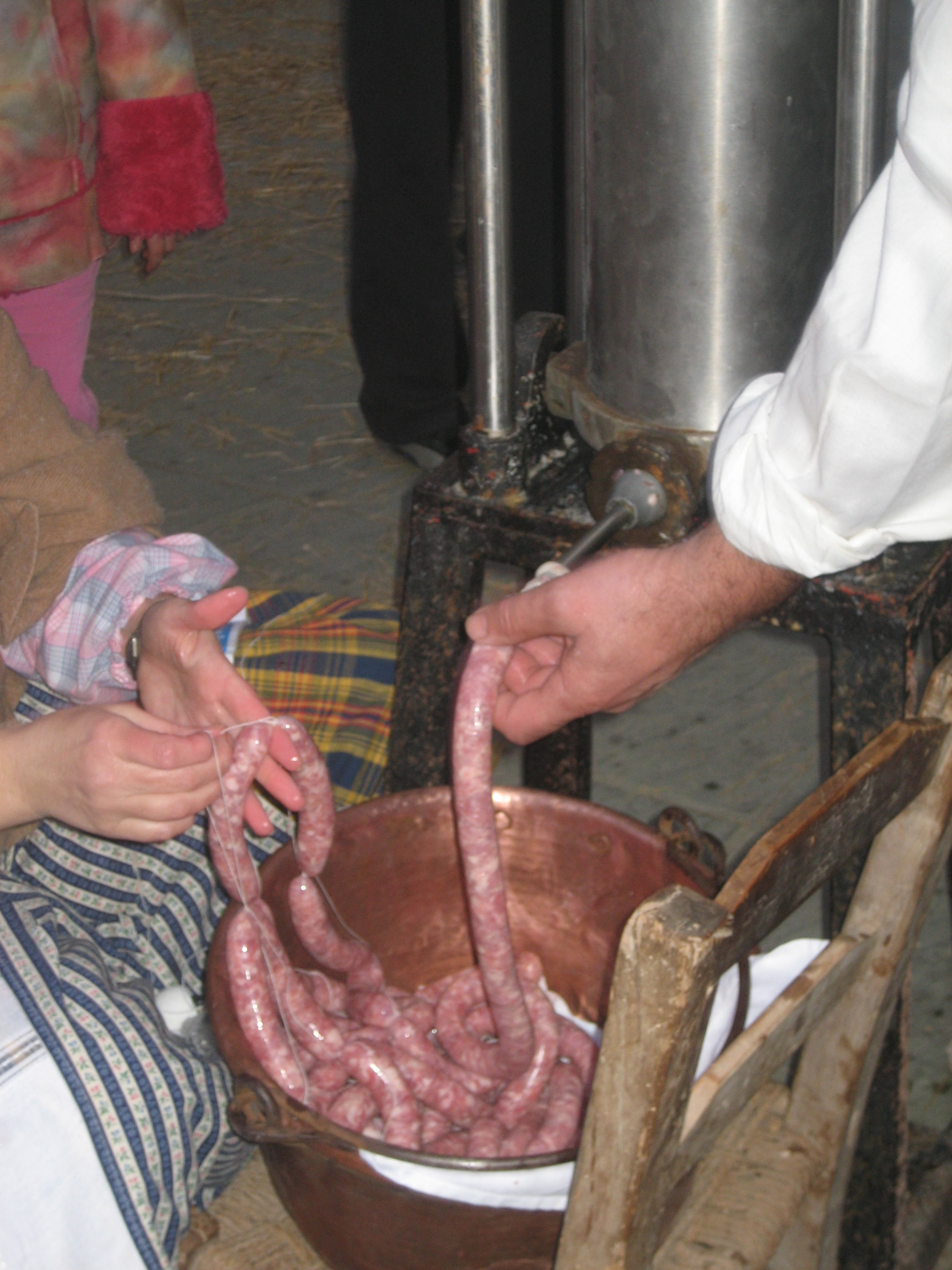 Demostració de producció tradicional de llonganises a la fira "Suera Obert Museu" a la localitat castellonenca de Suera, en 2010.